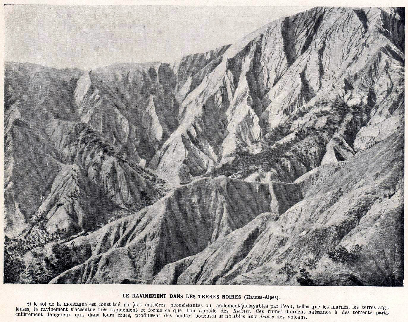 photo des Terres noires en haute-Provence.